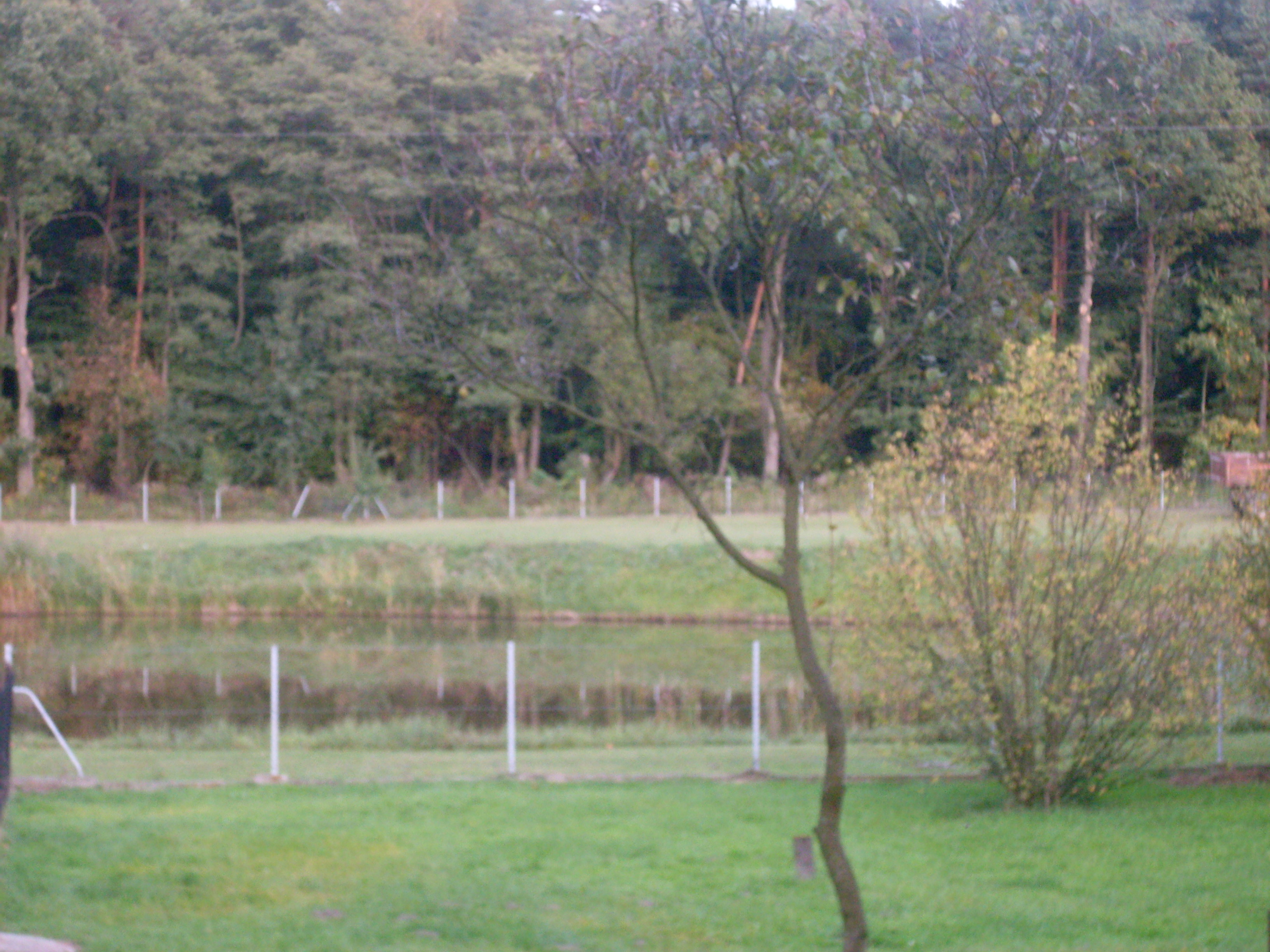 Stawki Papki.Tenczynek (Rzeczki)